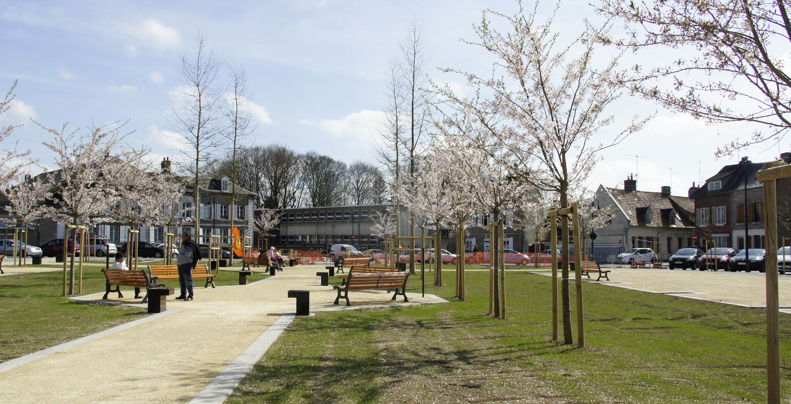 Place St Jacques avril 2015 - Abbeville Somme